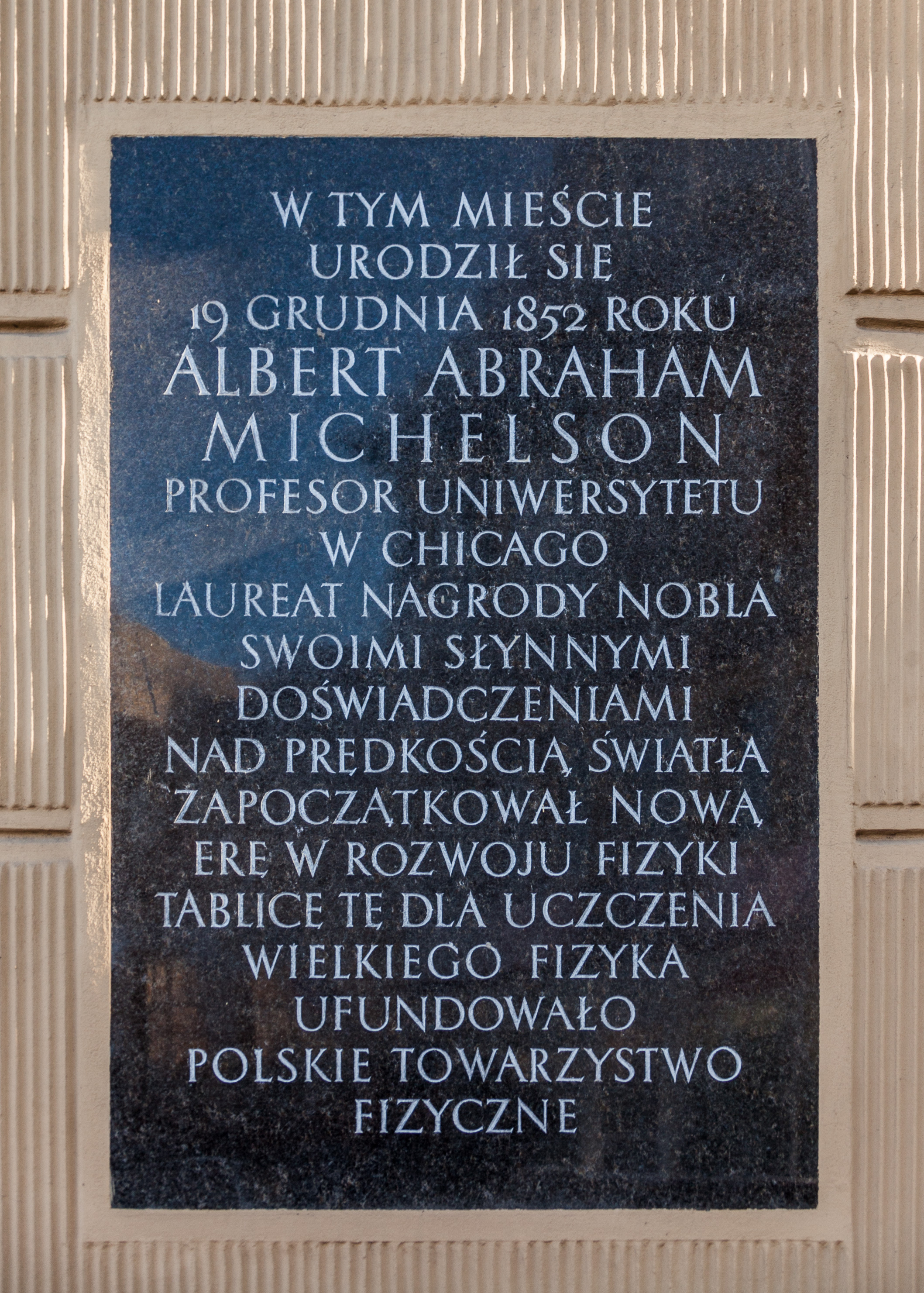 Strzelno, tablica pamiątkowa Alberta Abrahama Michelsona, laureata Nagrody Nobla w dziedzinie fizyki. Tekst na tablicy: „W TYM MIEŚCIE / URODZIŁ SIĘ / 19 GRUDNIA 1852 ROKU / ALBERT ABRAHAM / MICHELSON / PROFESOR UNIWERSYTETU / W CHICAGO / LAUREAT NAGRODY NOBLA / SWOIMI SŁYNNYMI / DOŚWIADCZENIAMI / NAD PRĘDKOŚCIĄ ŚWIATŁA / ZAPOCZĄTKOWAŁ NOWĄ / ERĘ W ROZWOJU FIZYKI / TABLICĘ TĘ DLA UCZCZENIA / WIELKIEGO FIZYKA / UFUDNOWAŁO / POLSKIE TOWARZYSTWO FIZYCZNE”.